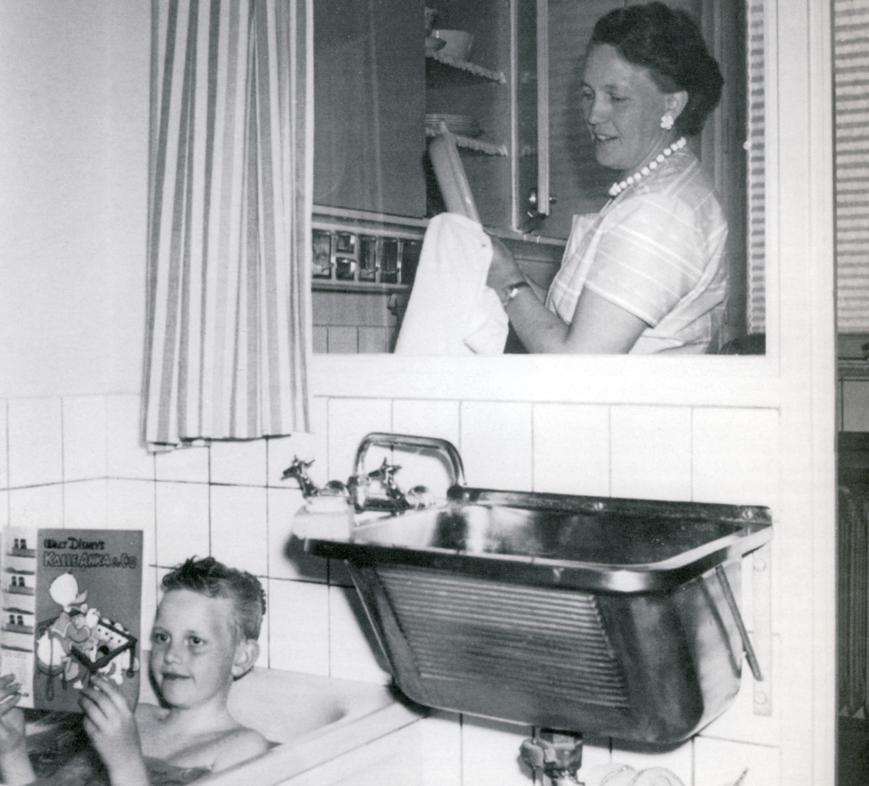 Baronbackarna i Örebro, hemmafrun hade uppsikt över badrummet genom ett fönster till köket